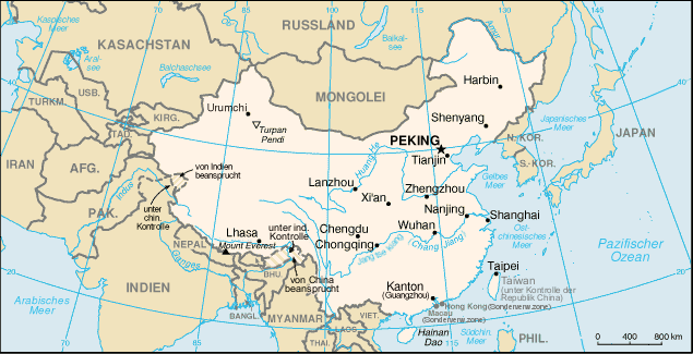 Karte von China